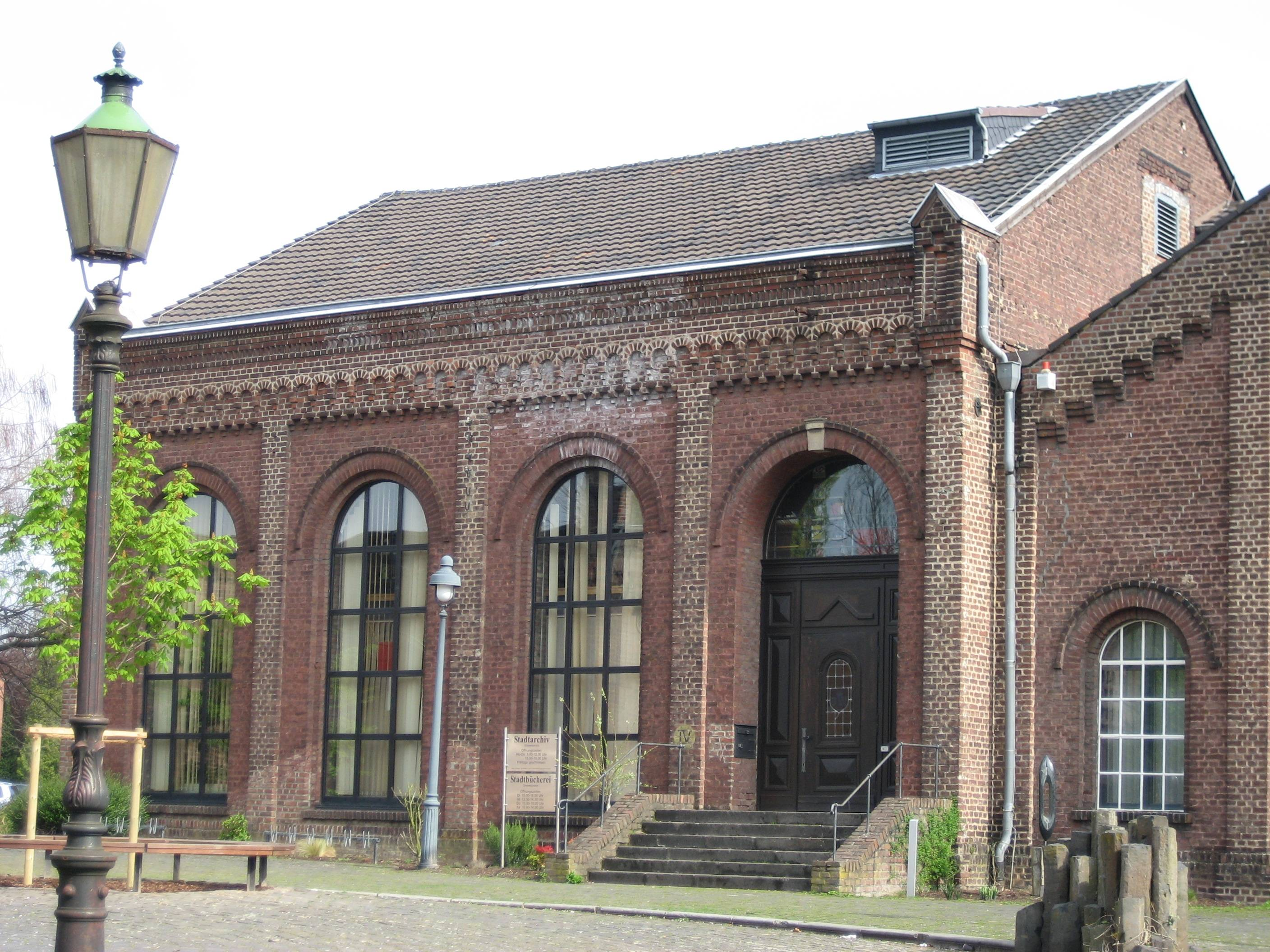 Stadtparkinsel in Grevenbroich. Verschiedene Aufnahmen 1-17. Motive sind die Gebäude der Stadtparkinsel (Waagehaus, Gebäude der Volkshochschule Grevenbroich, Auerbach-Haus sowie das Gebäude der Stadtbücherei) sowie die Villa Erckens